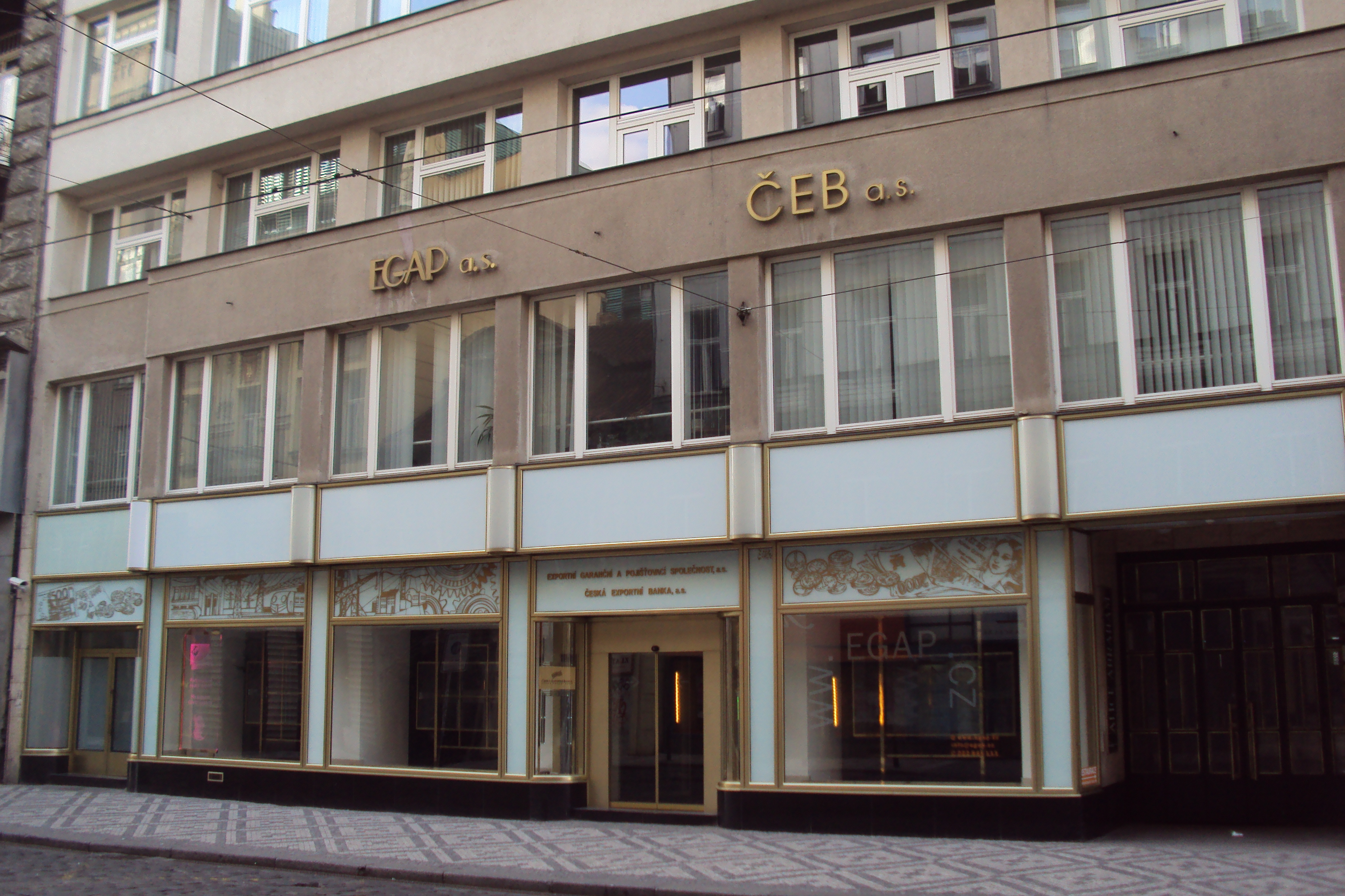 Česká exportní banka, Praha 1, Vodičkova ulice